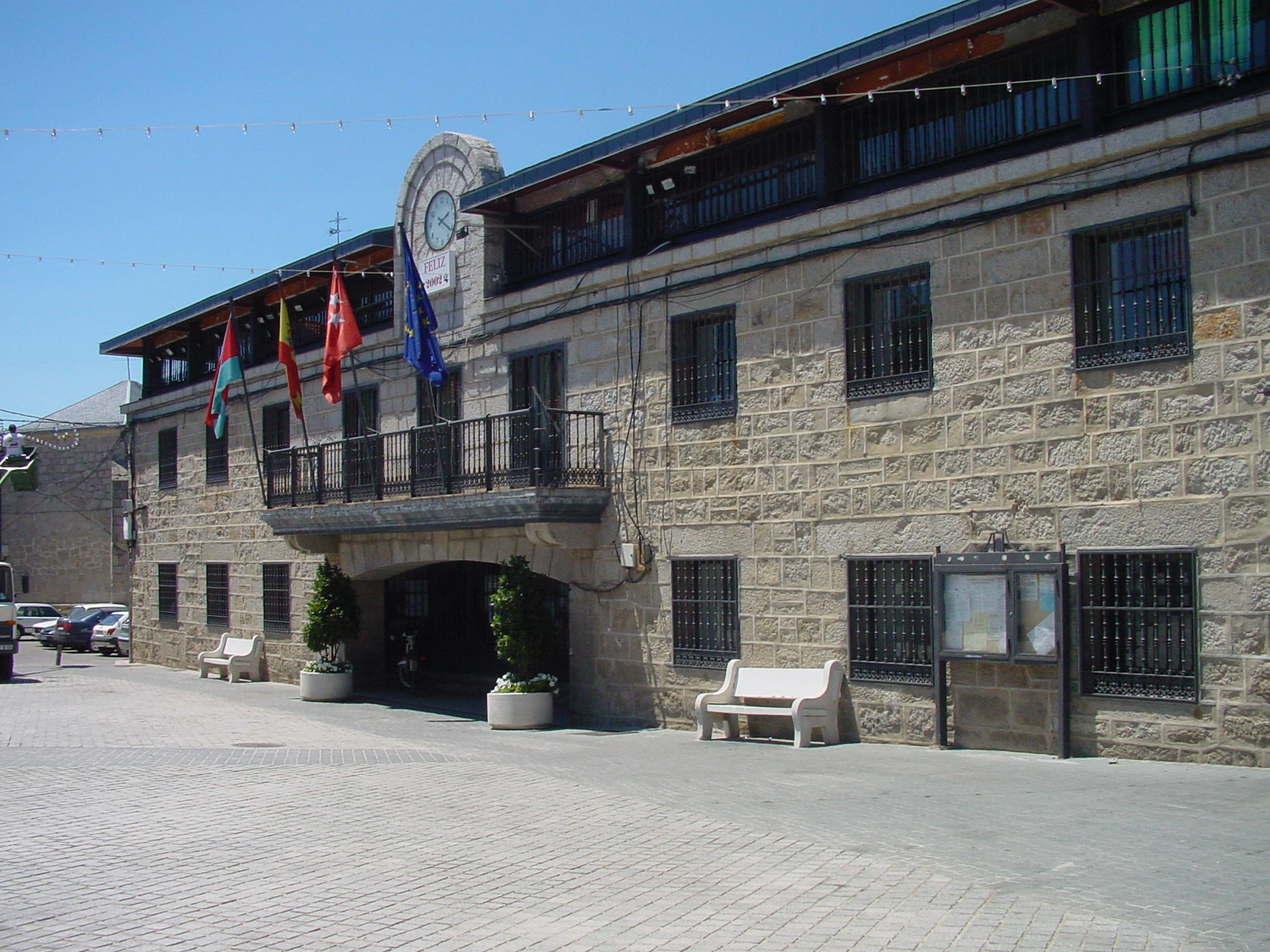 Ayuntamiento de Colmenarejo.